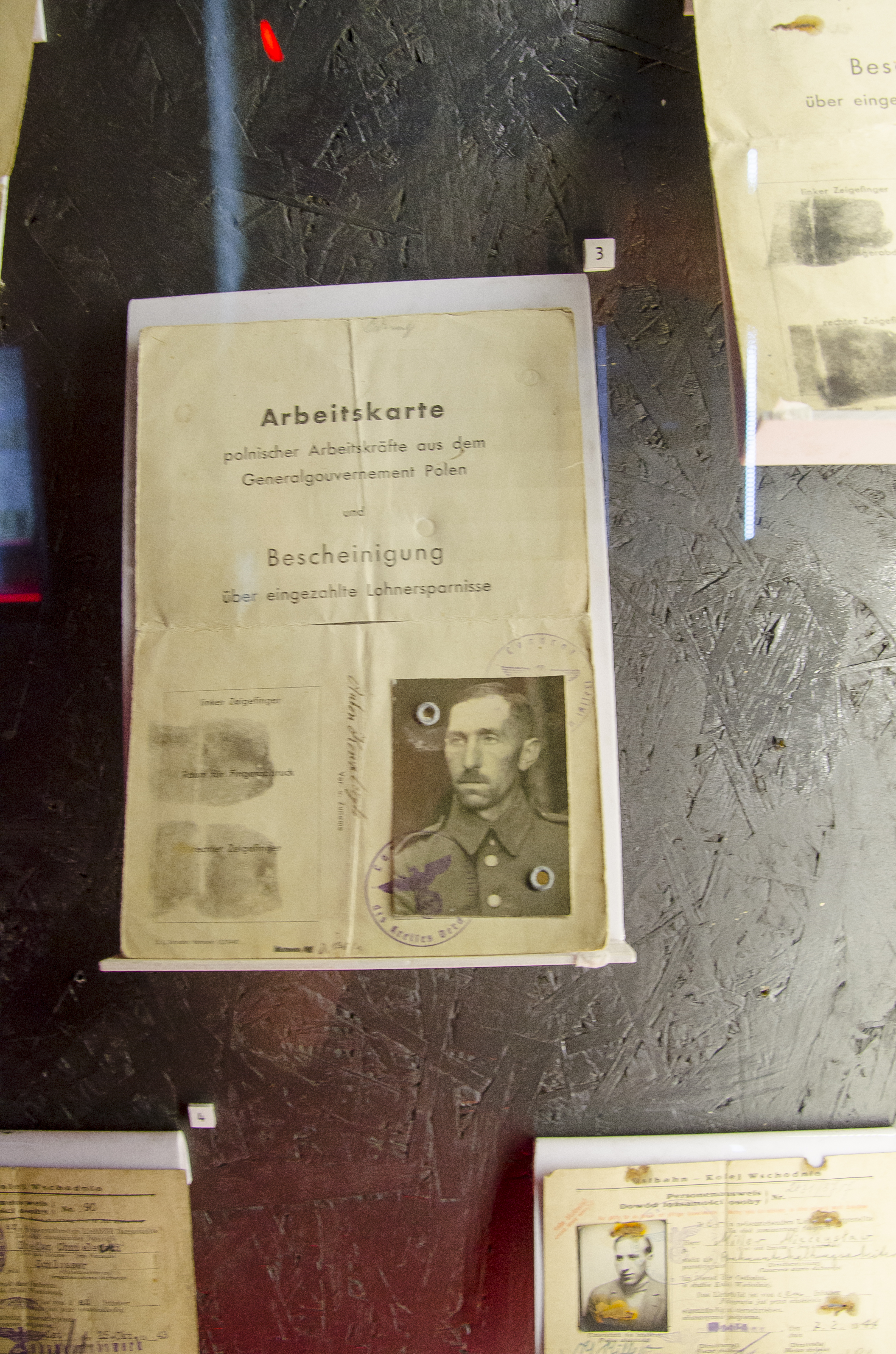 Warszawskie, Kraków, Poland